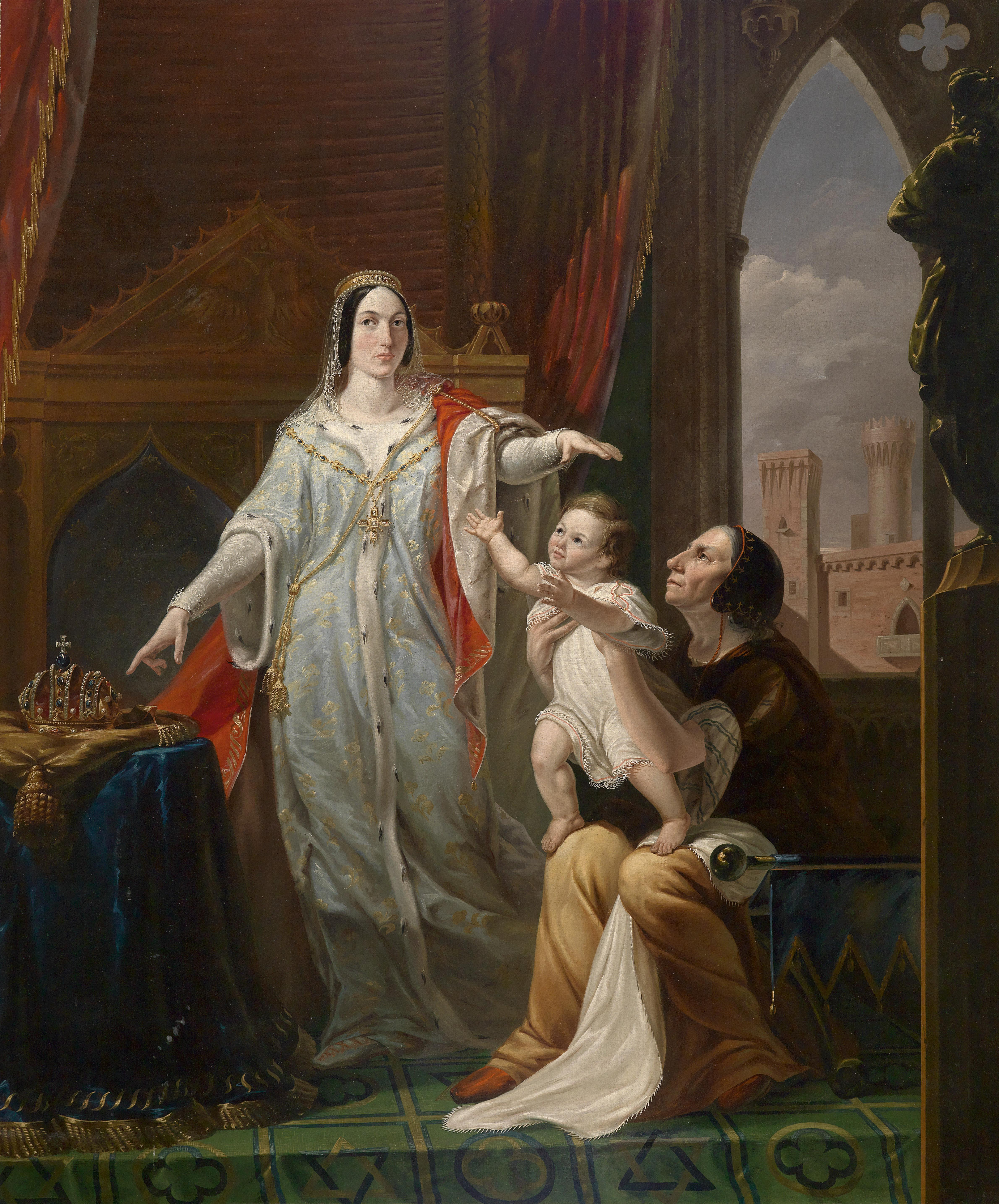 "Das königliche Schicksal des Infanten Friedrich II von Hohenstaufen im Kindesalter"; Öl auf Leinwand, 223,5 x 190,5 cm